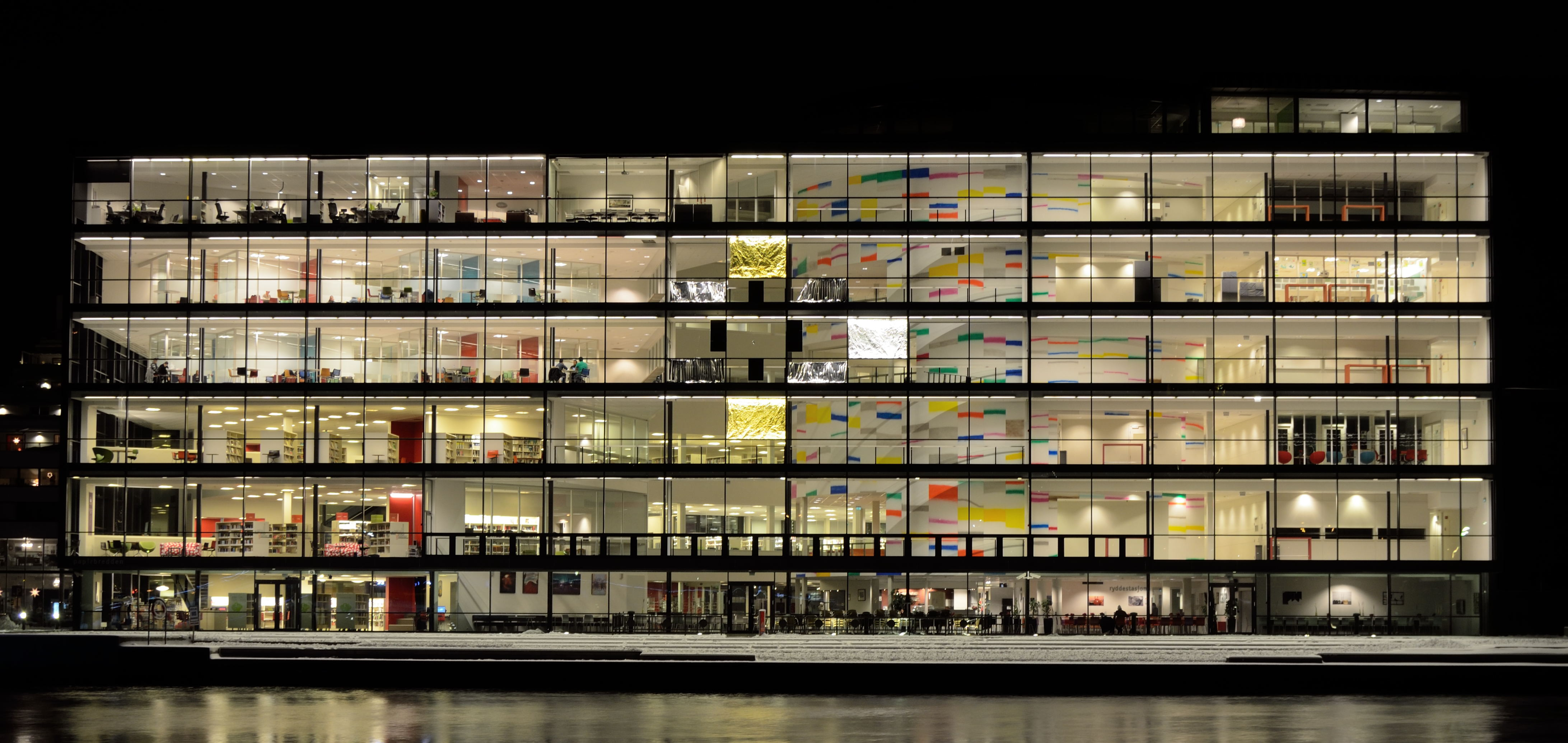 Nattbilde av Drammen bibliotek Unknown